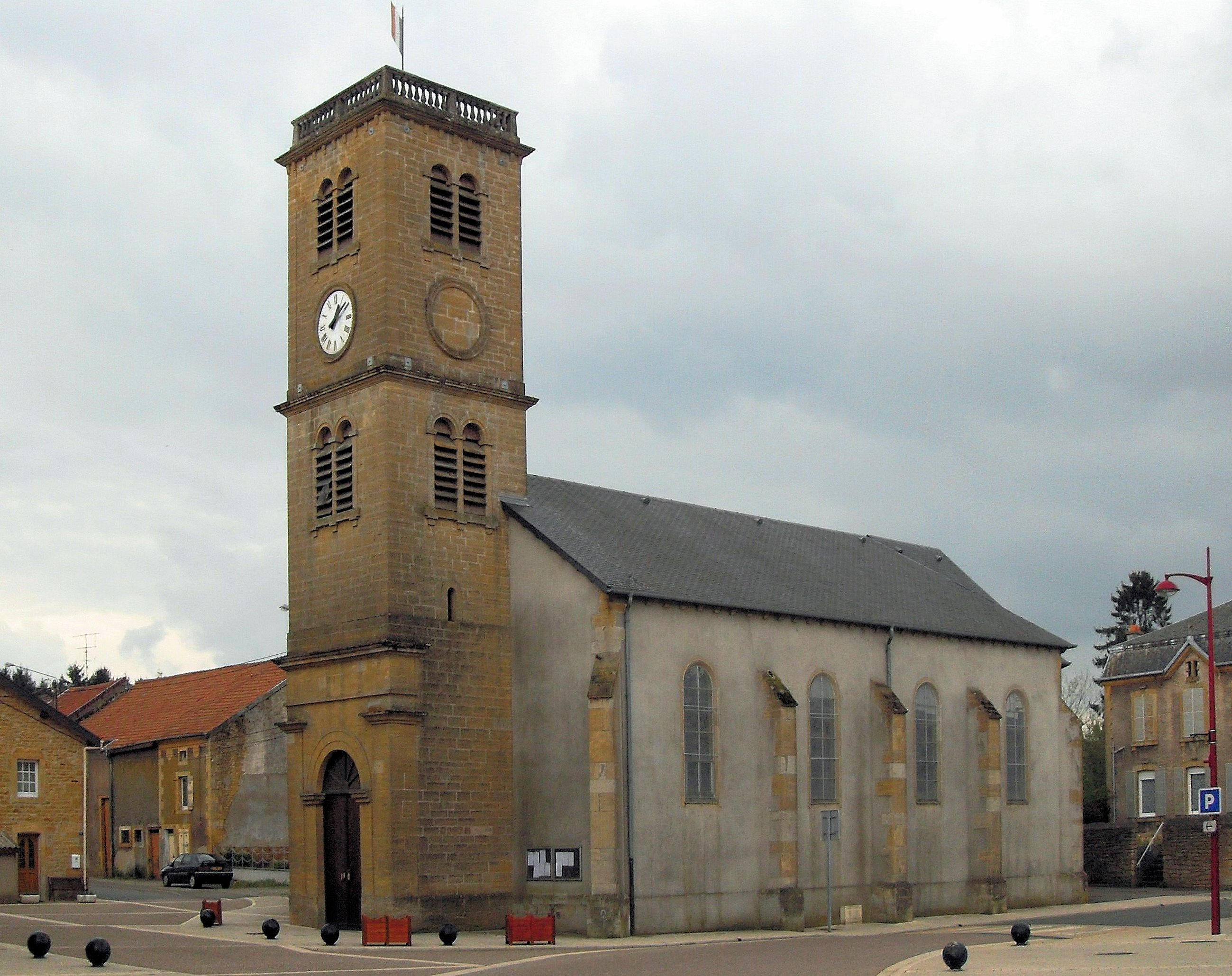 L'église Saint-Eloi à Haucourt, commune Haucourt-Moulaine